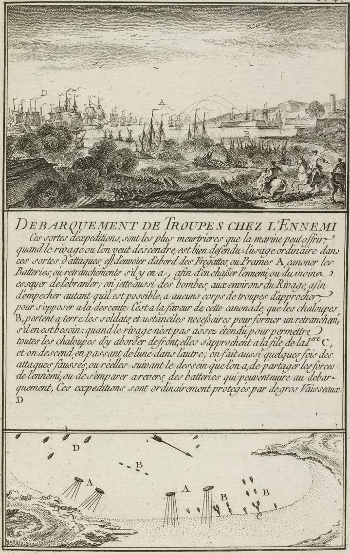 Texte et schéma explicatif d'une opération de débarquement telle qu'elle pouvait se produire au milieu du XVIIIème siècle. Extrait de Marine militaire, ou Recueil des différents vaisseaux qui servent à la guerre, suivis des manœuvres qui ont le plus de rapport au combat ainsi qu'à l'attaque et la défense des ports, par Ozanne l'aîné. Ouvrage rédigé après la Guerre de Sept Ans qui a vu d'importantes opérations de débarquement menées par la Royal Navy contre les possessions françaises et espagnoles.